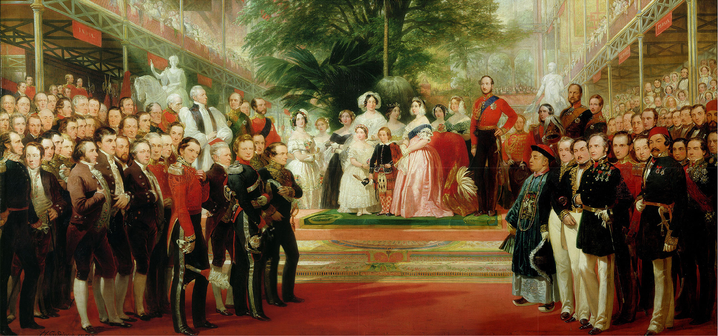 La reine Victoria et la famille à l'ouverture de la grande exposition, Hyde Park, Londres, 1 mai 1851